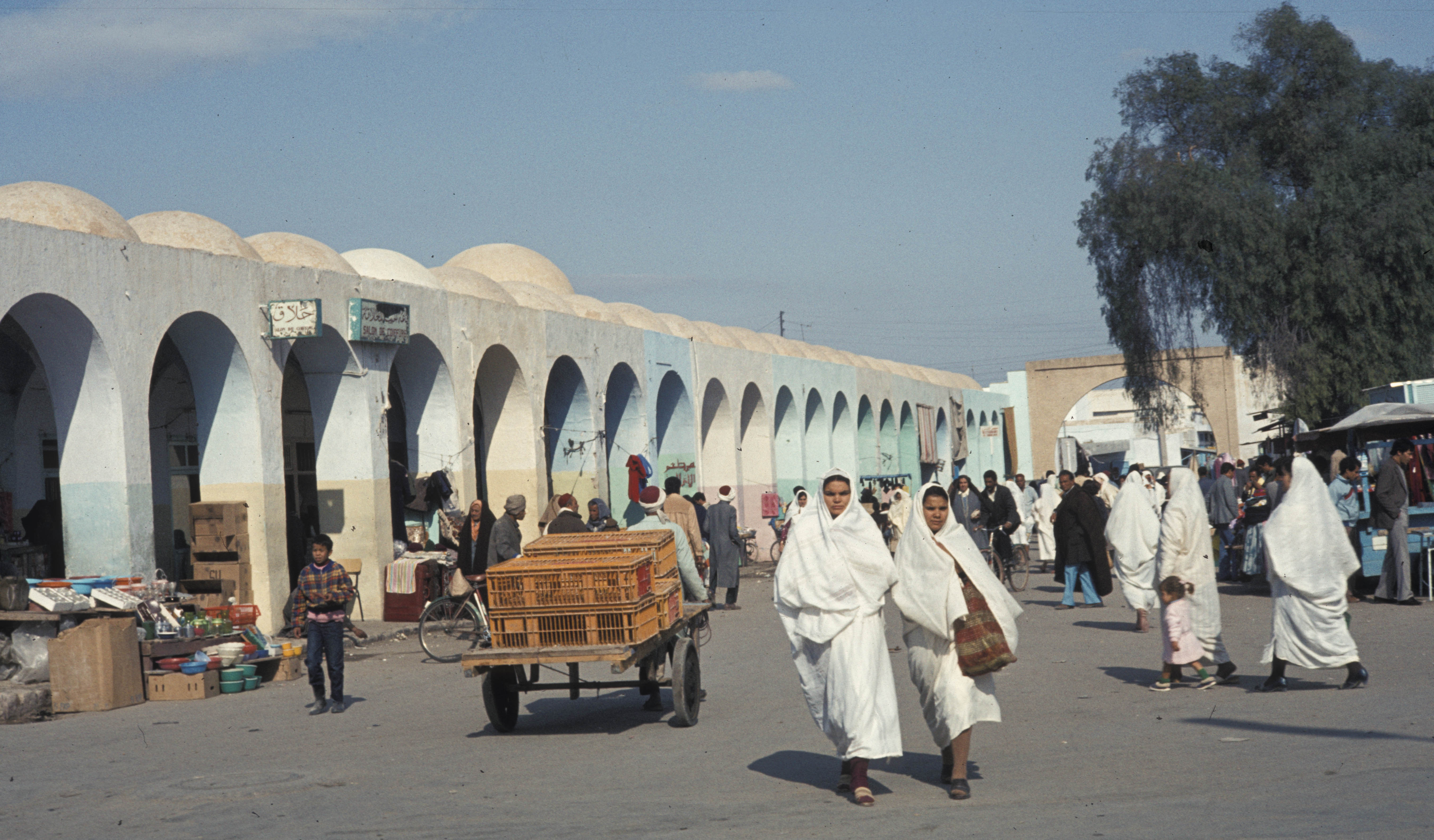 Tunisia